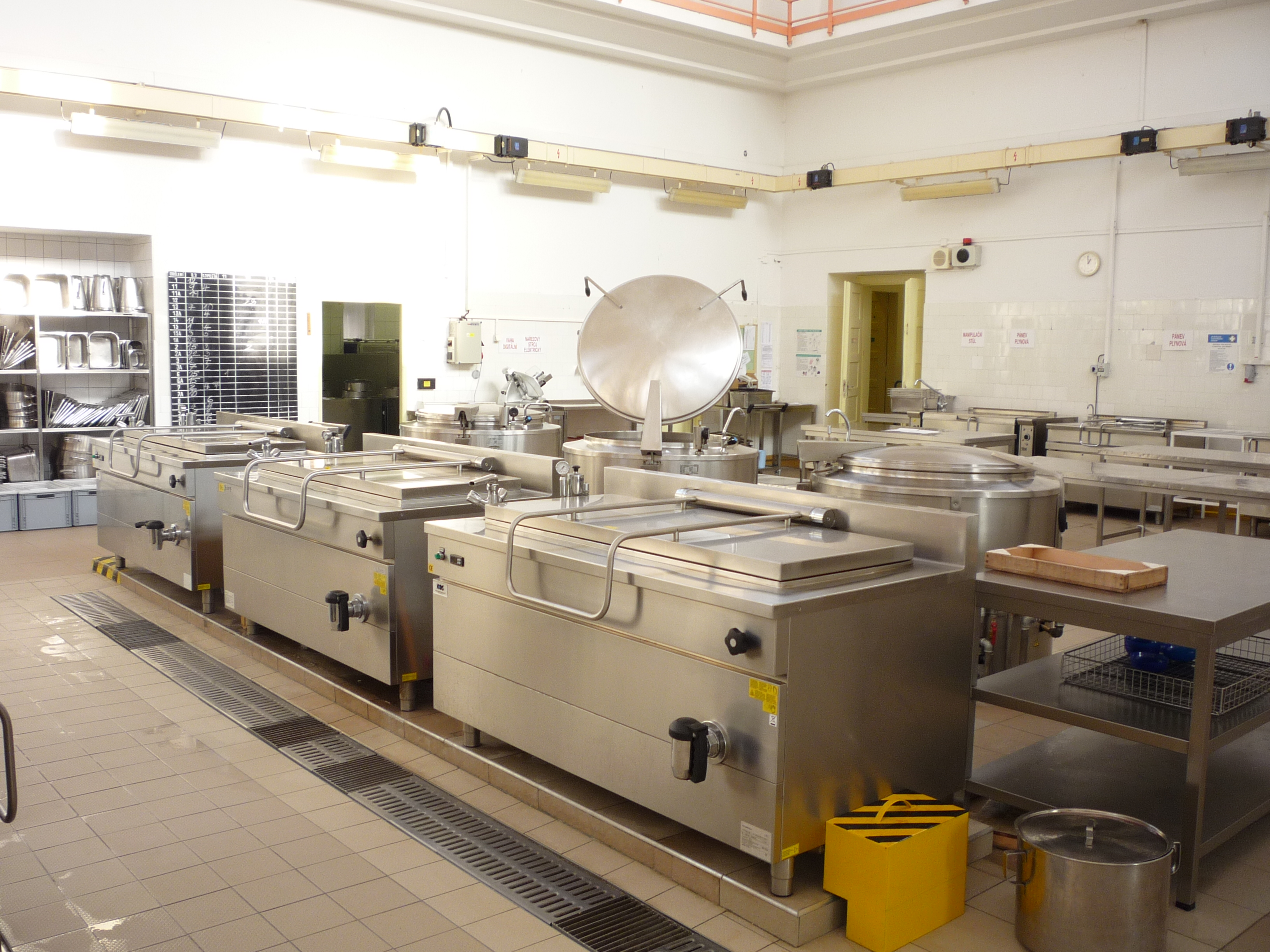 Autor fotografie Jiří Zelenka. Psychiatrická nemocnice Havlíčkův Brod - hospodářský provoz (kuchyně - varna). Rozkošská 2322, 58023 Havlíčkův Brod. Kraj Vysočina. Czech Republik.